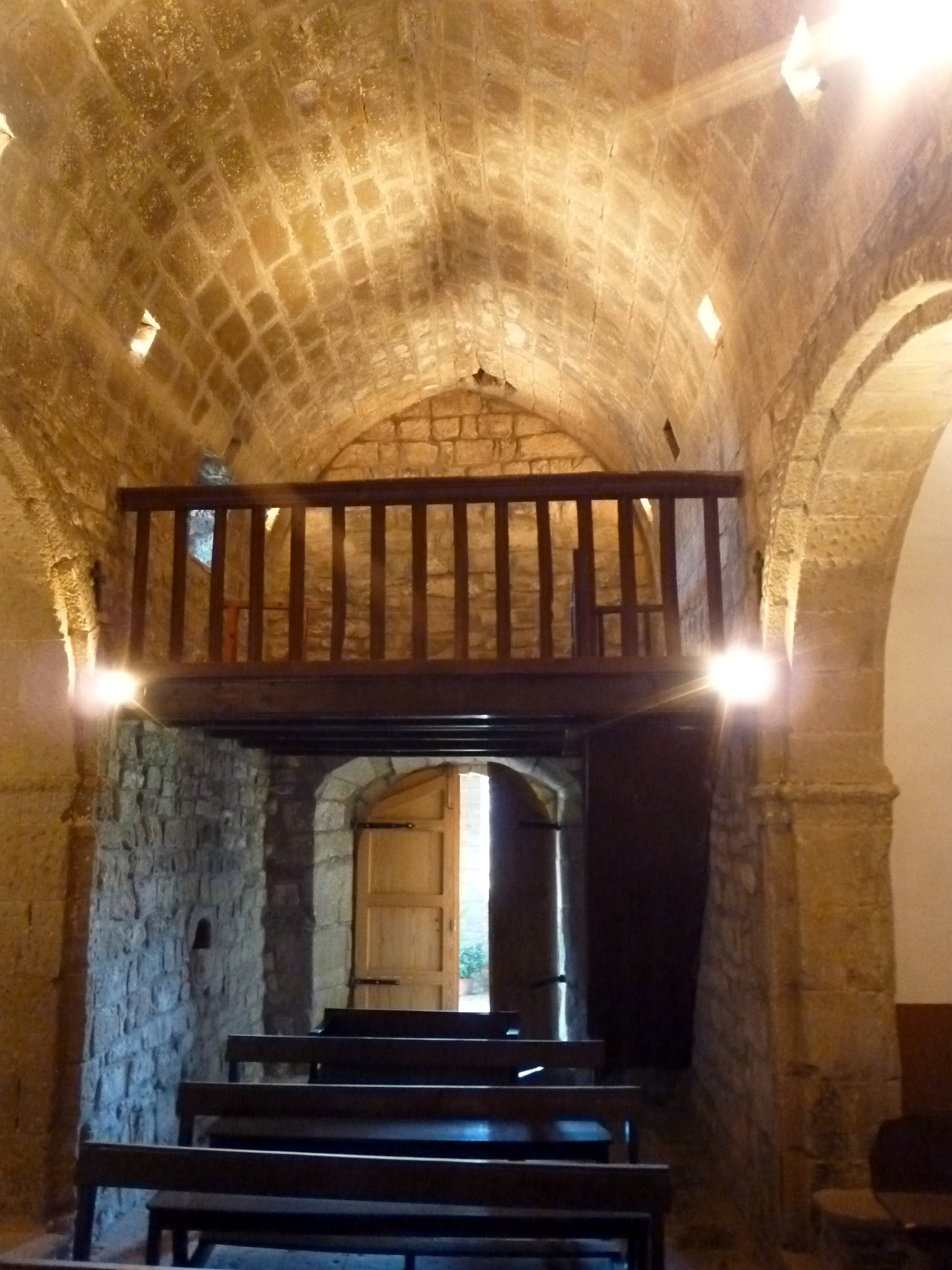 Església de Santa Magdalena de Fígols (Montmajor): el cor